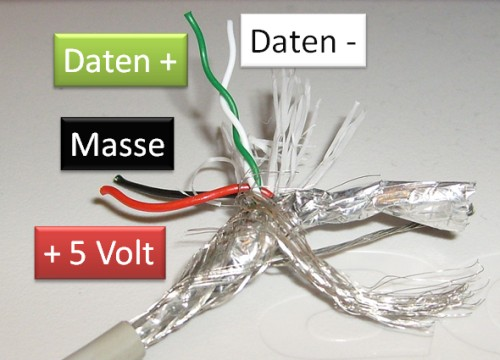 Ein abgeschirmtes USB-Kabel, dessen einzelne Kabel beschriftet sind.